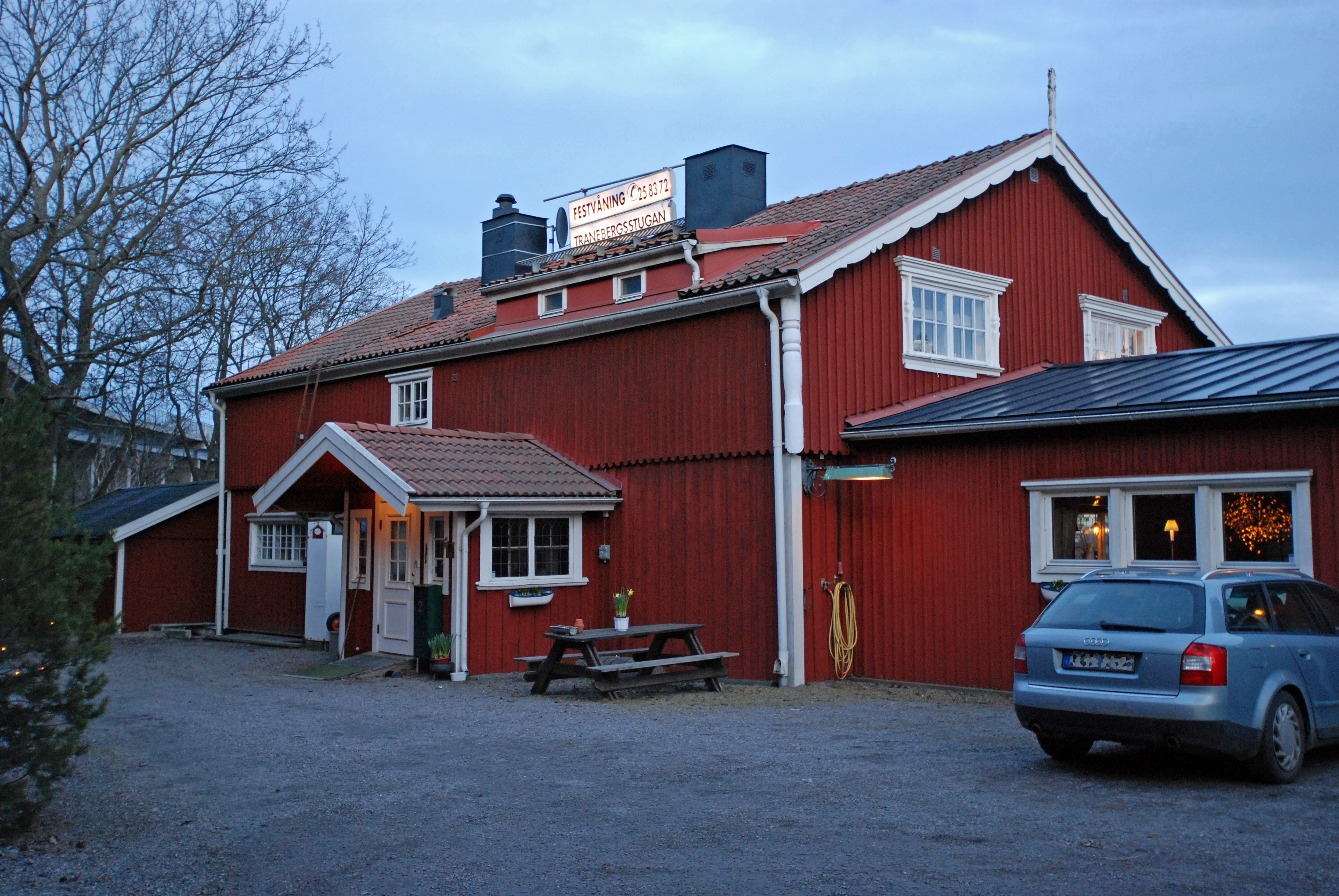 Tranebergsstugan